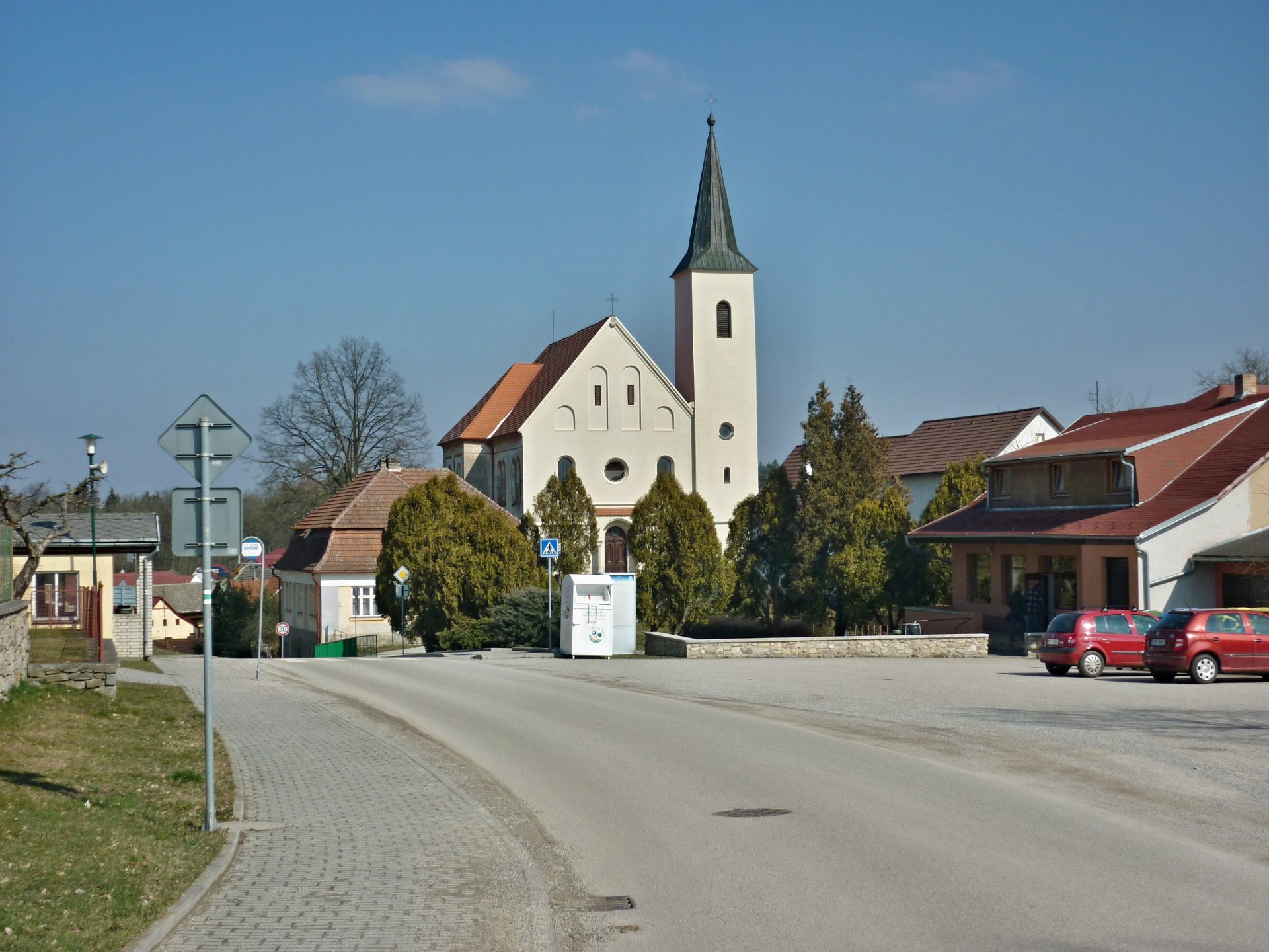 Blažejov - náves)